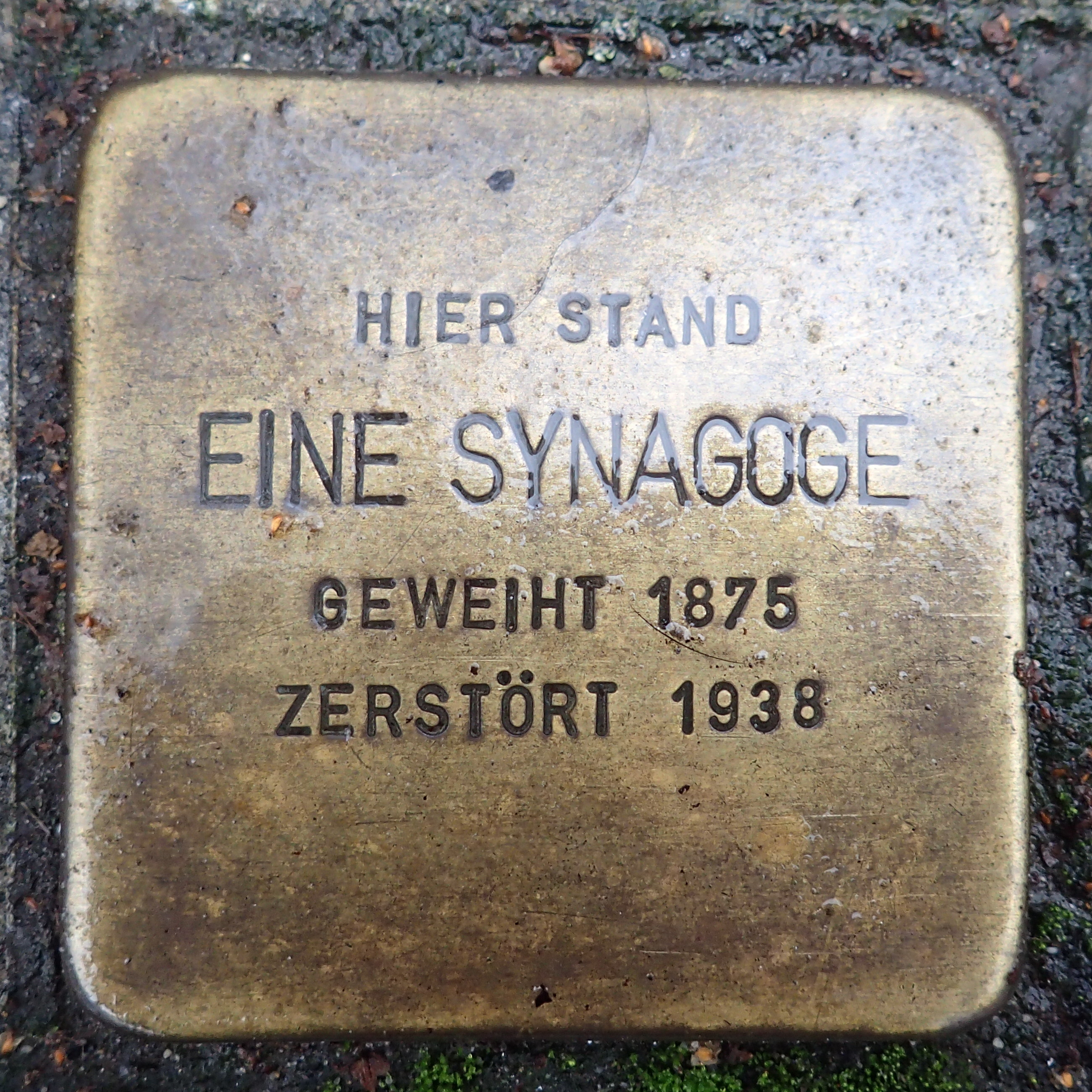 Stolperstein Geldern Nordwall 39 Synagoge